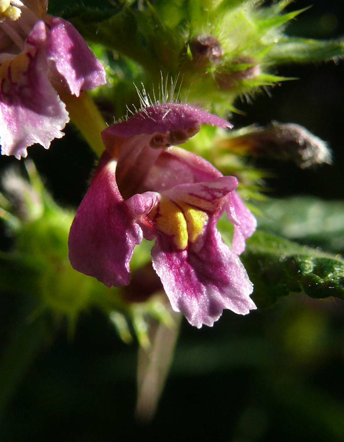 Galeopsis pubescens, Schwäbisch-Fränkische Waldberge, Deutschland